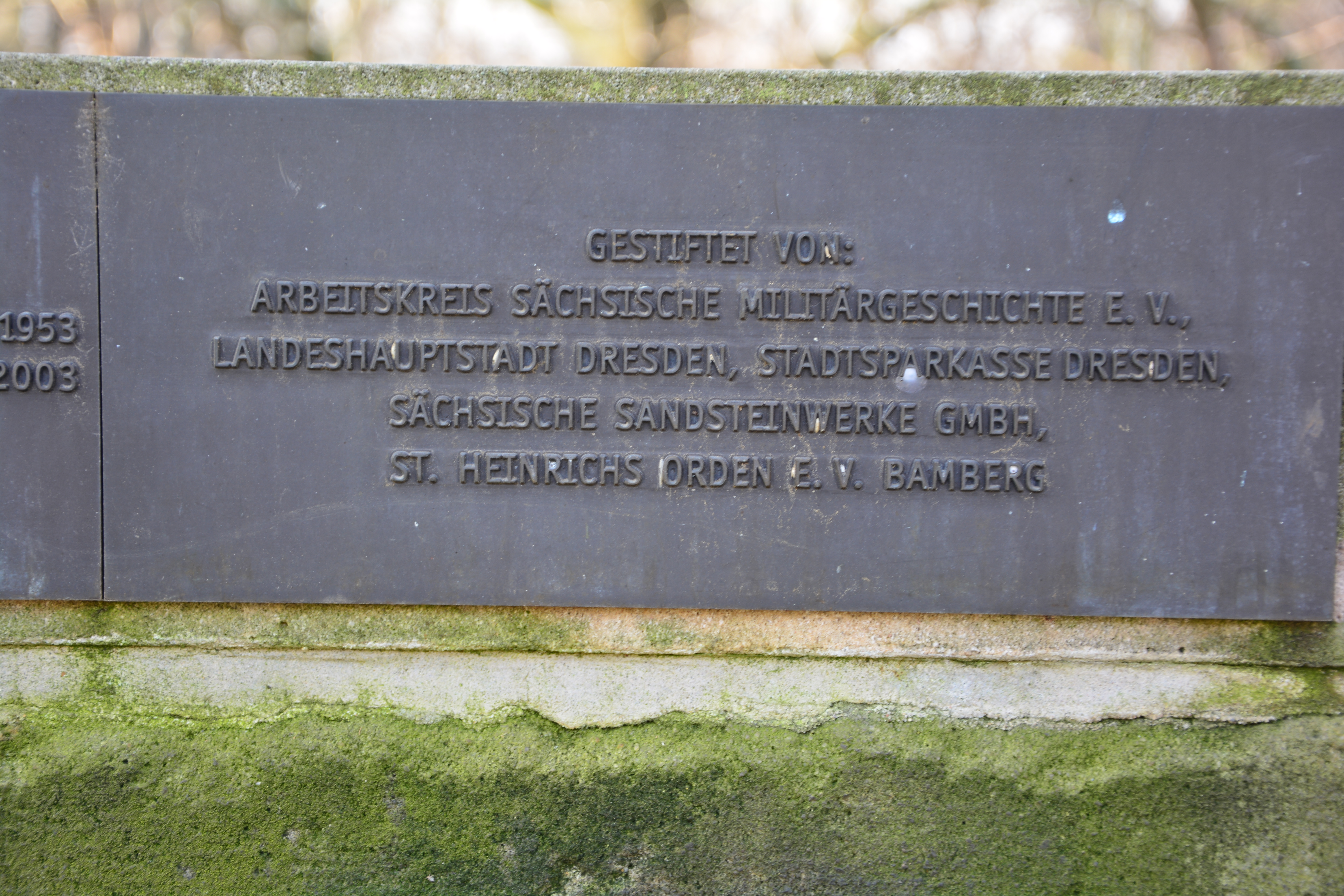 Dresden, Stauffenbergallee 12 (gegenüber) Garde-Reiter-Denkmal 2018, Photos by User:Bybbisch94